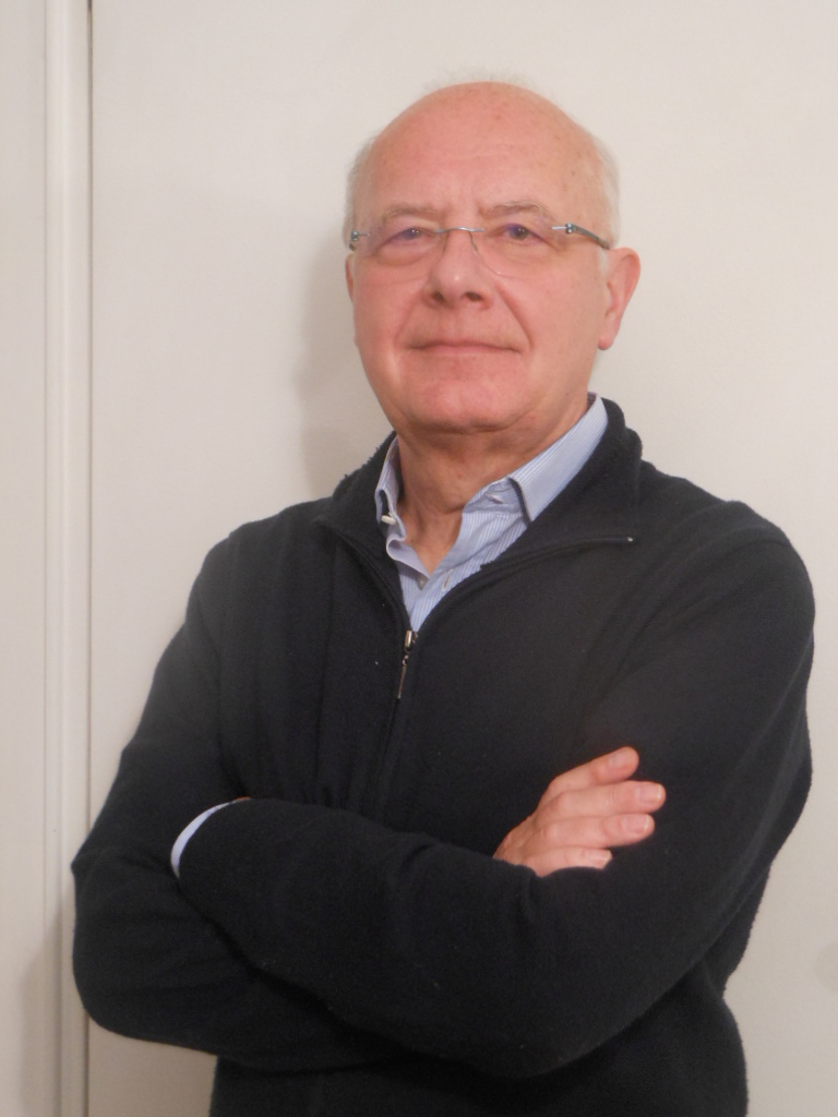 Paride Rugafiori